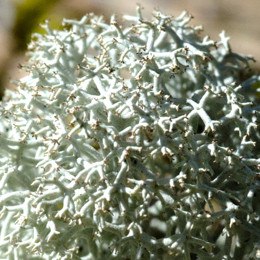 ягель макро